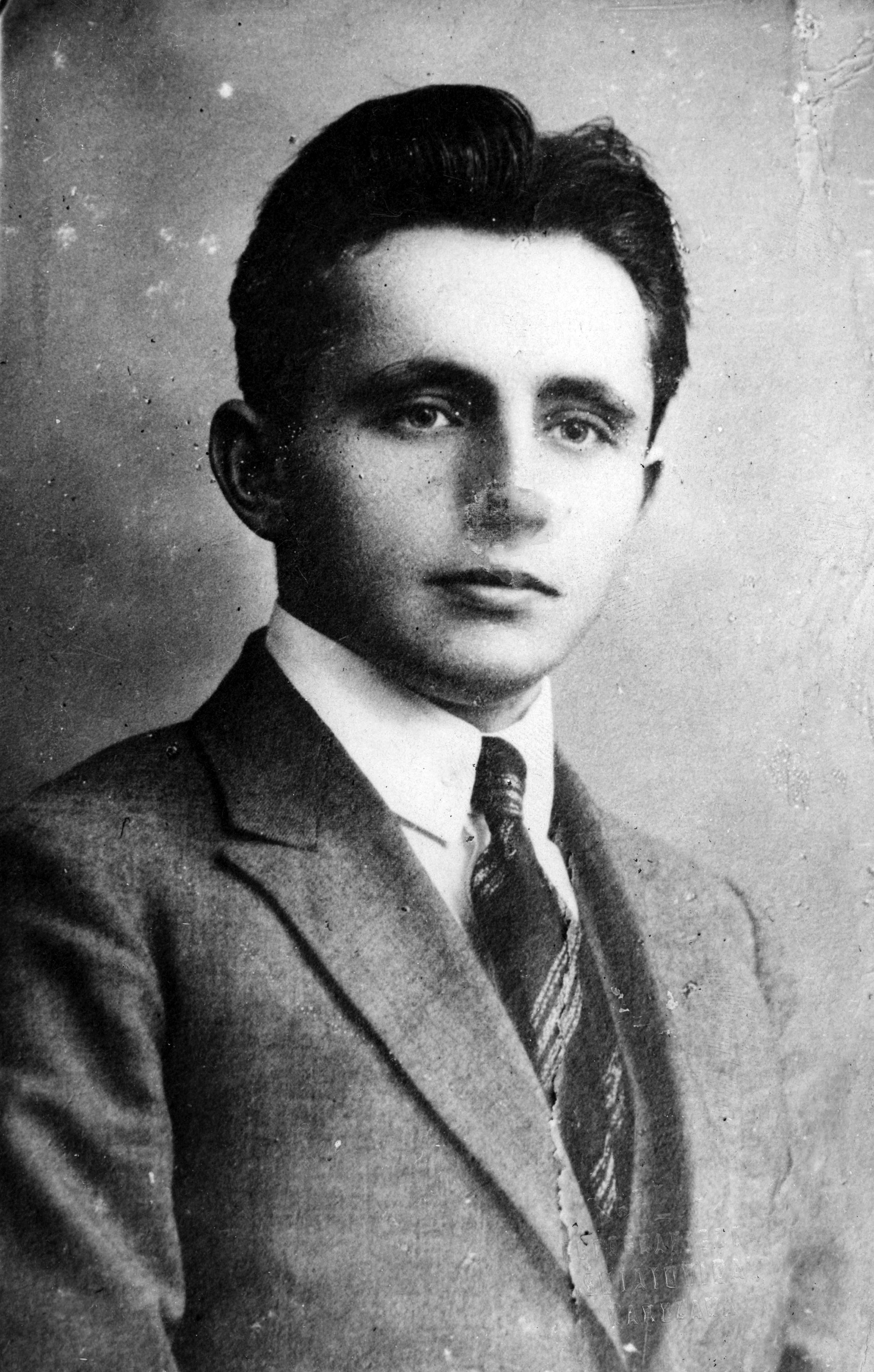 Poseł Stanisław Dubois